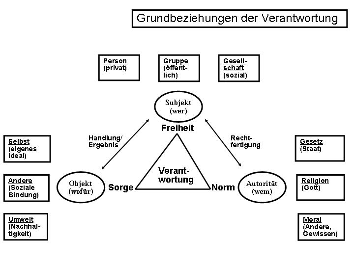 Graphik zur Erläuterung der Grundbeziehungen zum Begriff Verantwortung